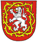 Znak města Jaroměř